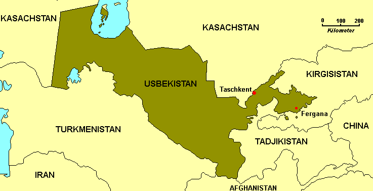 Lag vu Fergana op der Koart.